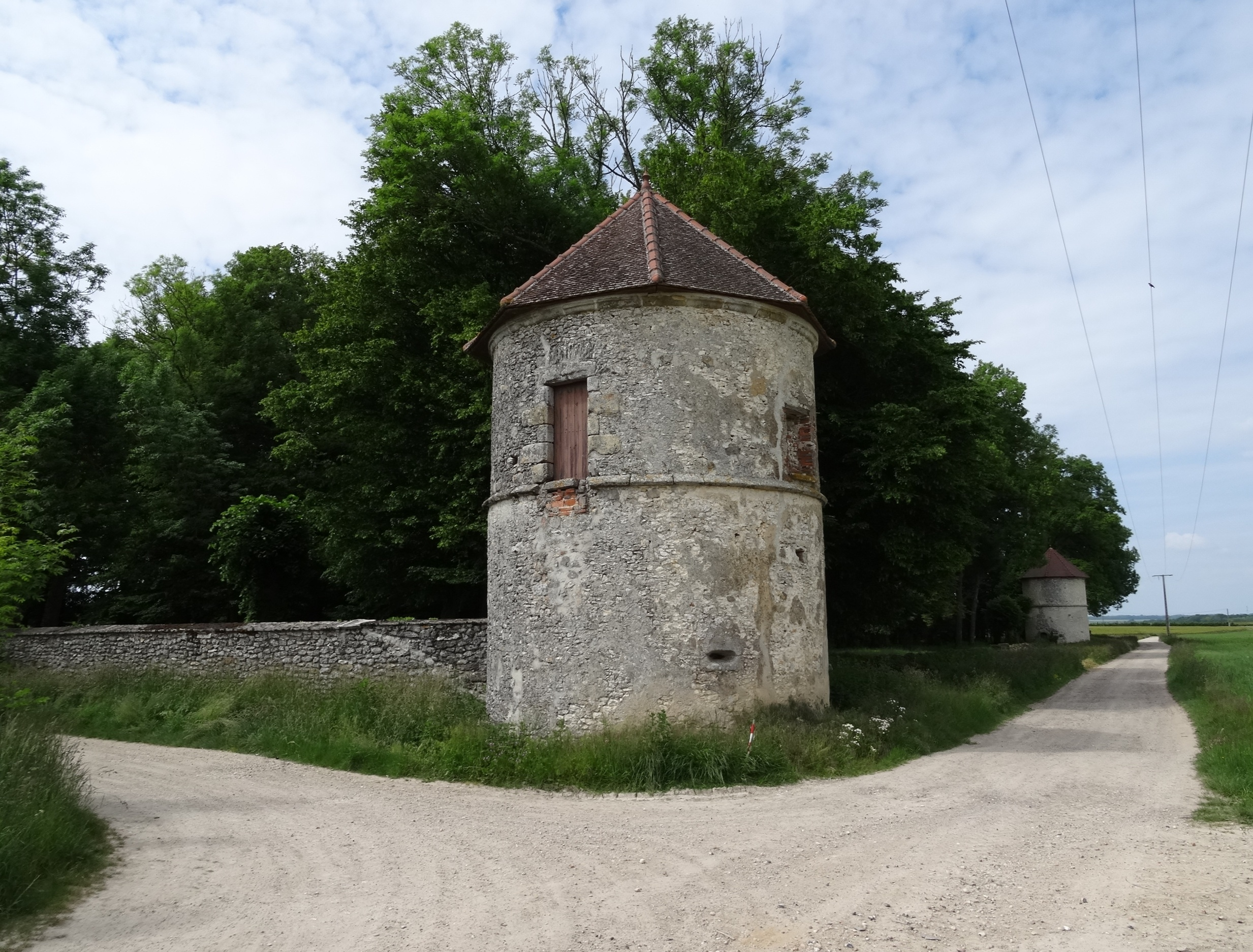 Tourelles au fond du parc du château de l'Ormurion. (Sourdun, Seine-et-Marne, région Île-de-France).